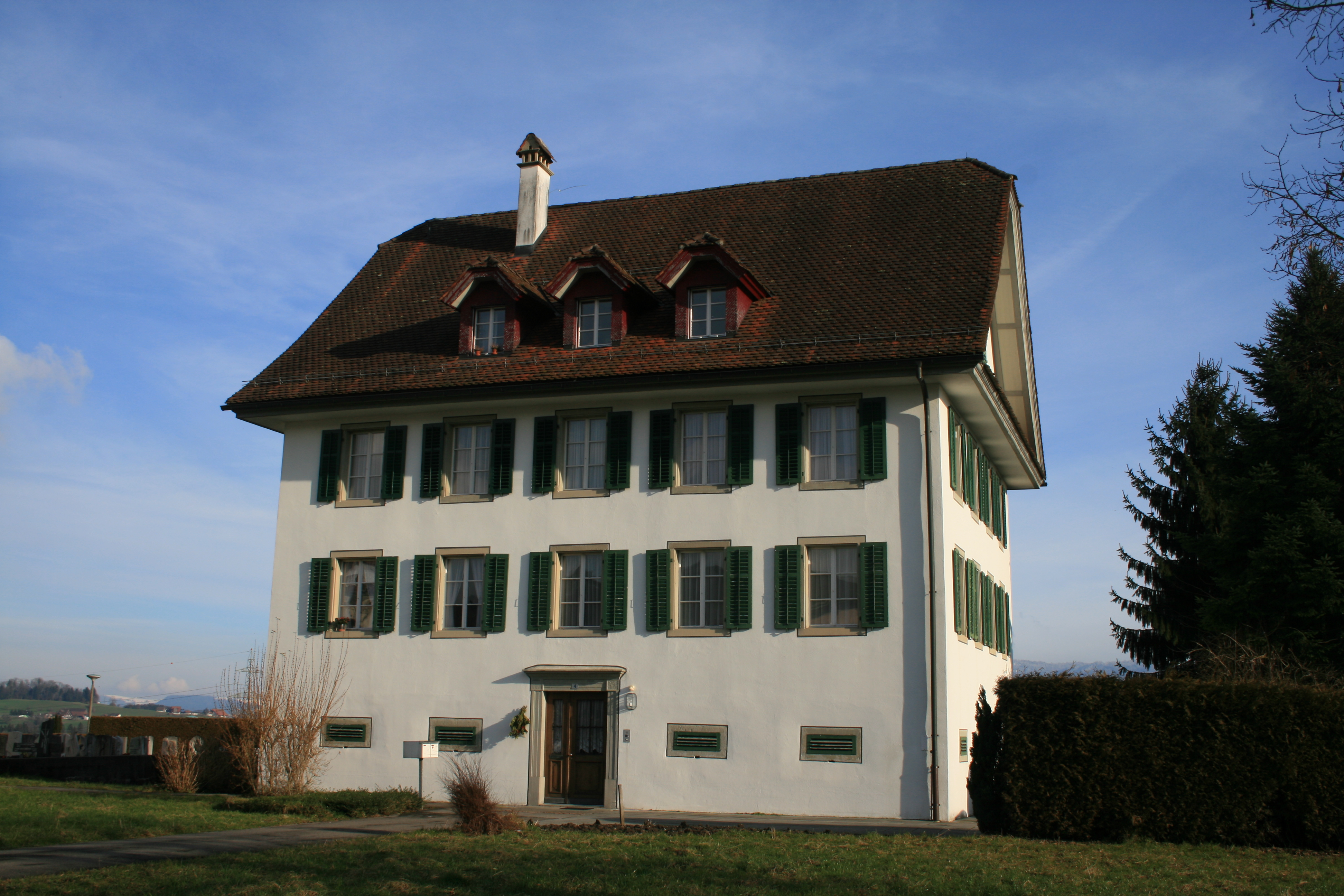 Dietwil